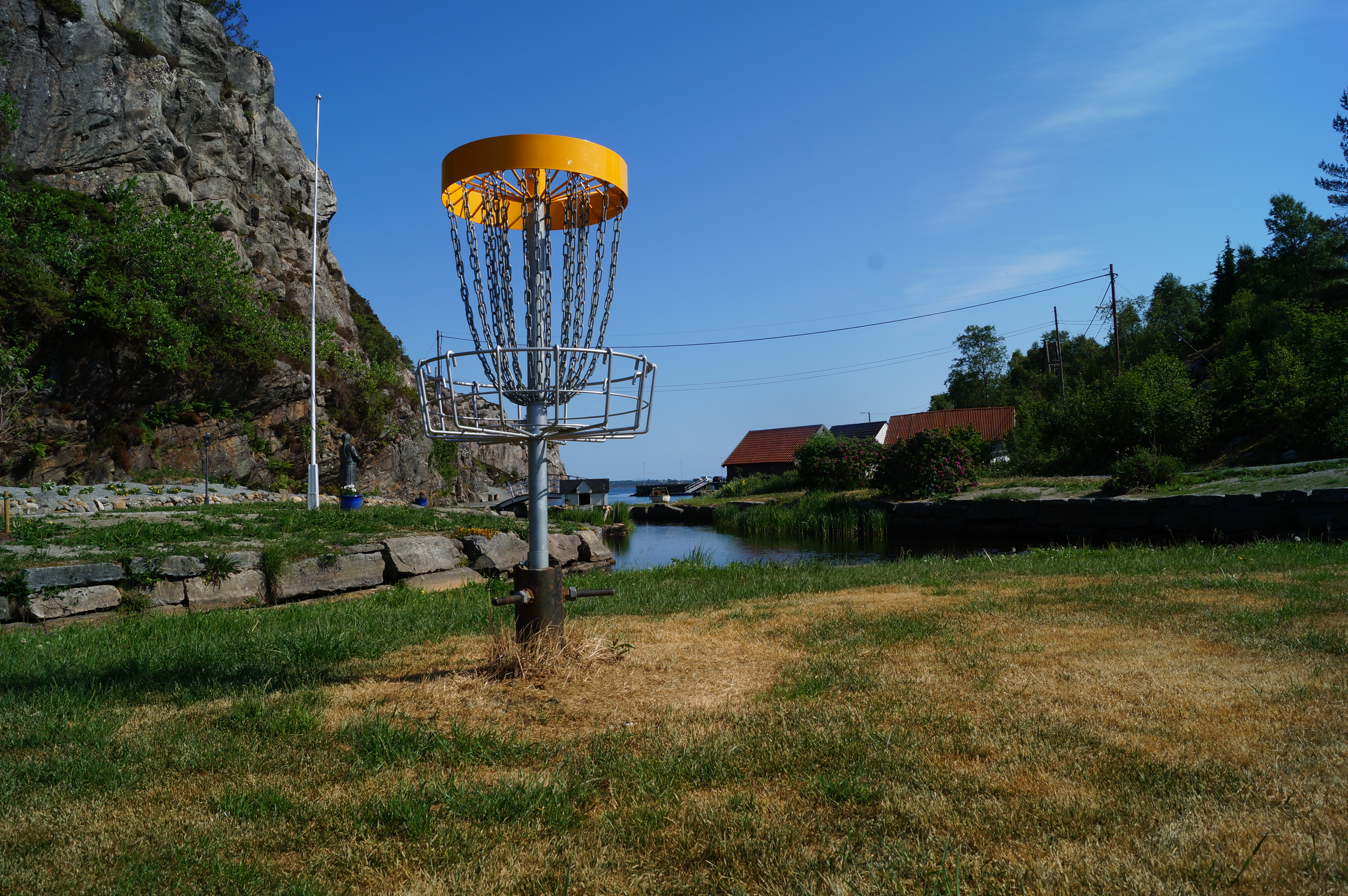 Frisbeegolf på Haganes, Fjell kommune